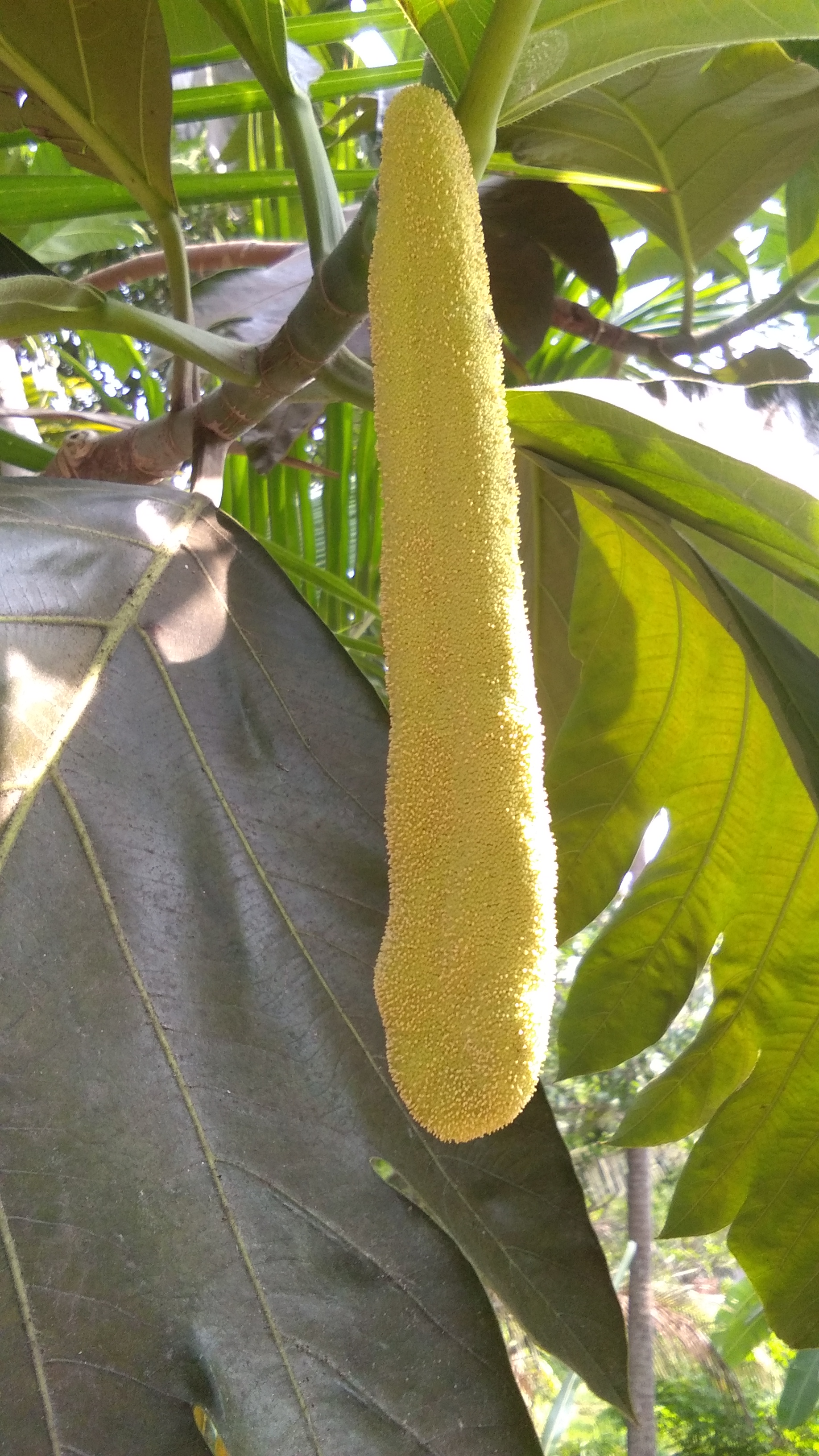 Artocarpus altilis fruit in kerala